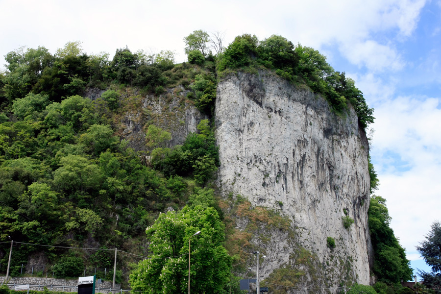 La falesia su cui sorgeva la Rocca di Arona